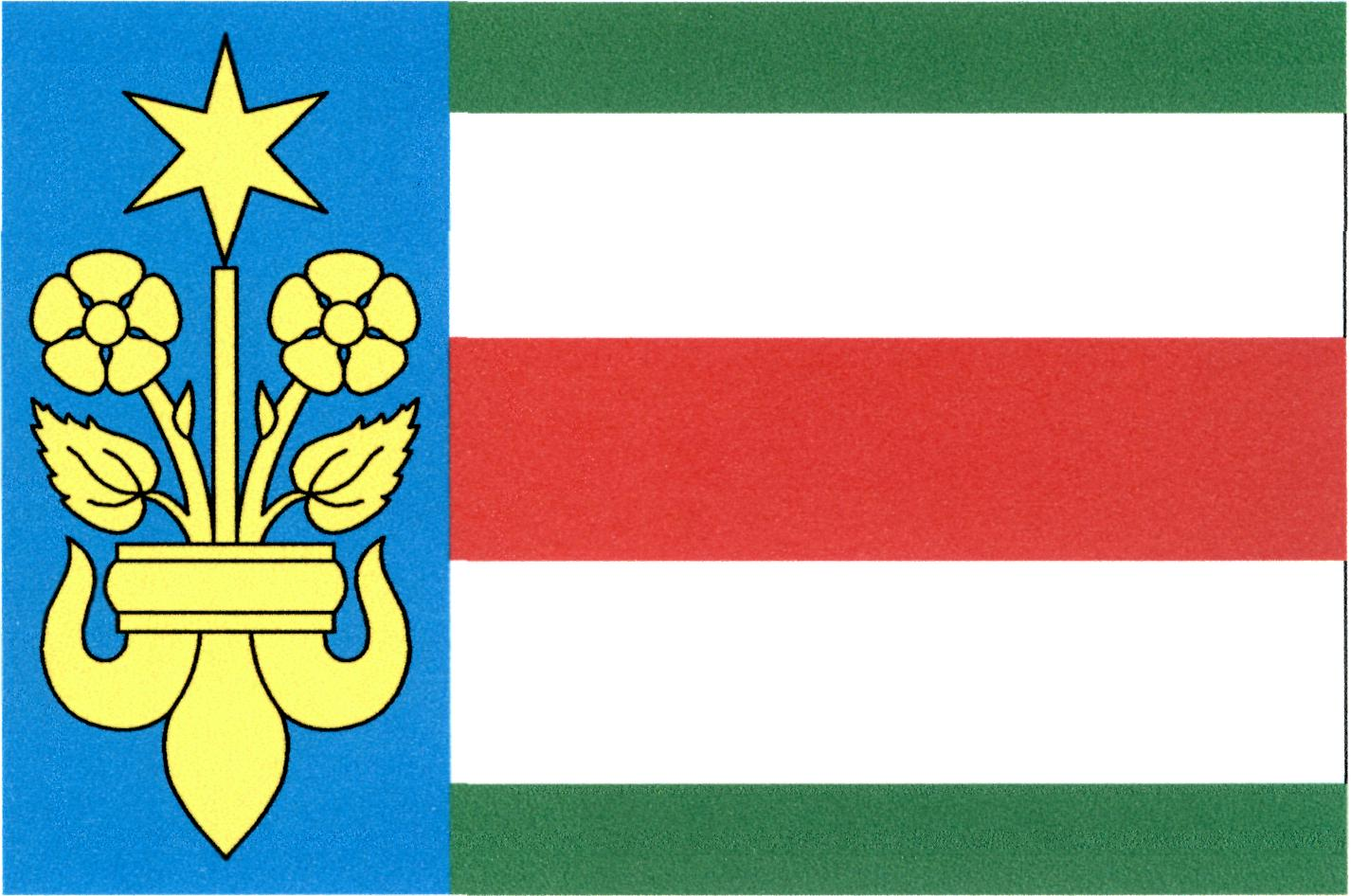 Vlajka obce Záchlumí (okres Tachov)